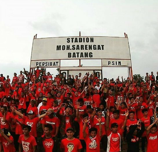 Suporter Persibat Batang